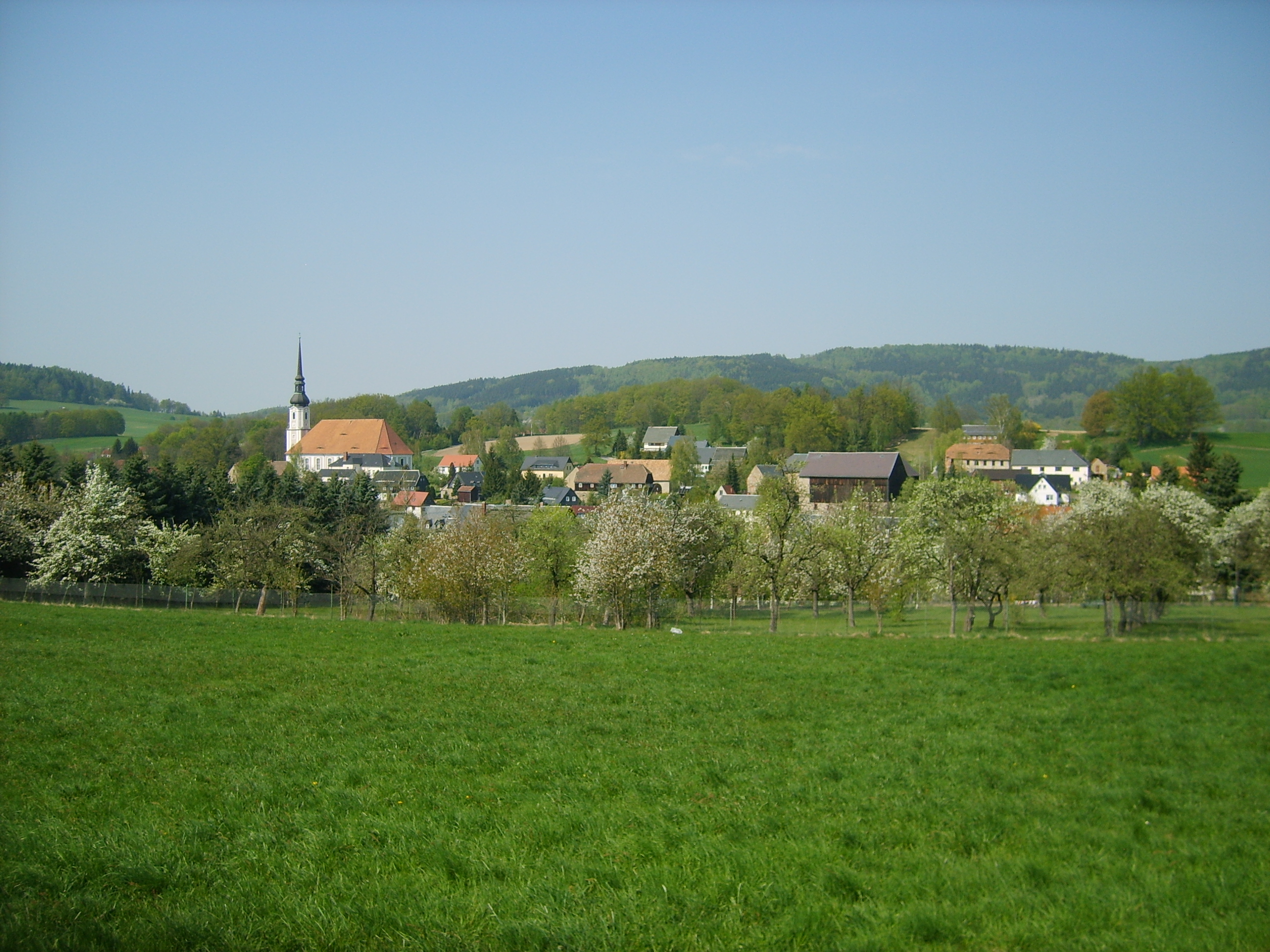 Ortsansicht im Frühjahr